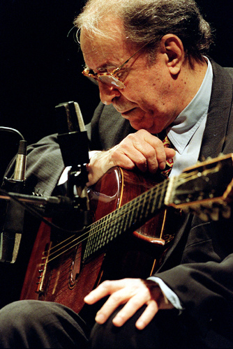 Brazilian singer João Gilberto